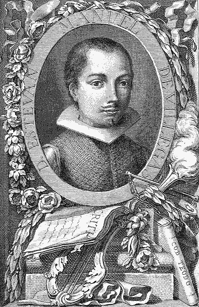 Retrato de Esteban Manuel de Villegas, por Pascual Pedro Moles (1741-1797), Autor secundario: Charles de La Traverse(1726-1780) imprenta de Antonio de Sancha, impresor. Iconografía Hispana 9869-1